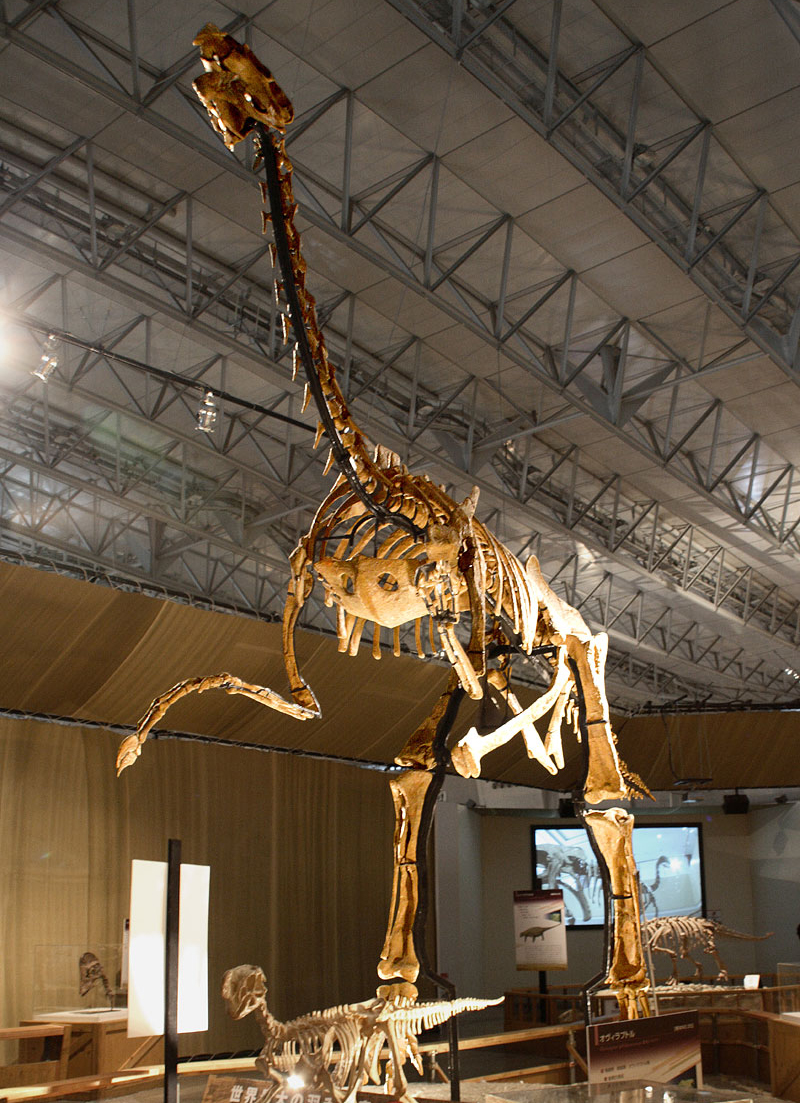 Gigantoraptor - 01